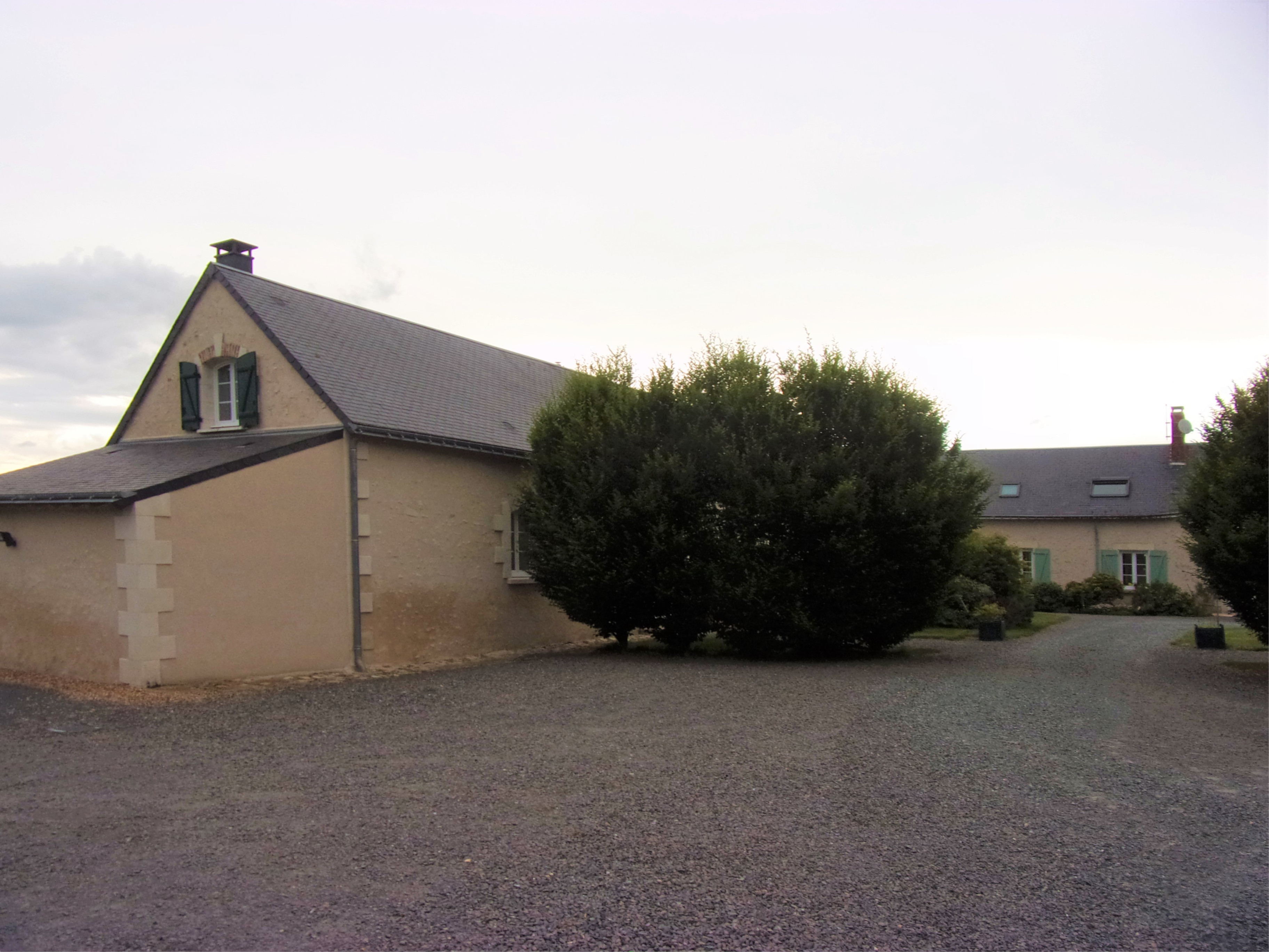 Vue partielles des bâtiments de la ferme de Bourg Neuf (Rillé)